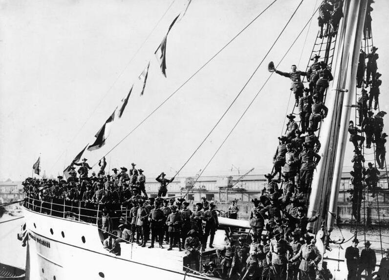 Transport der Kaiserlichen Schutztruppe für Deutsch-Süd-West-Afrika. Abfahrt des Dampfers "Alexandra Woermann" von Hamburg nach dem Kriegsschauplatz